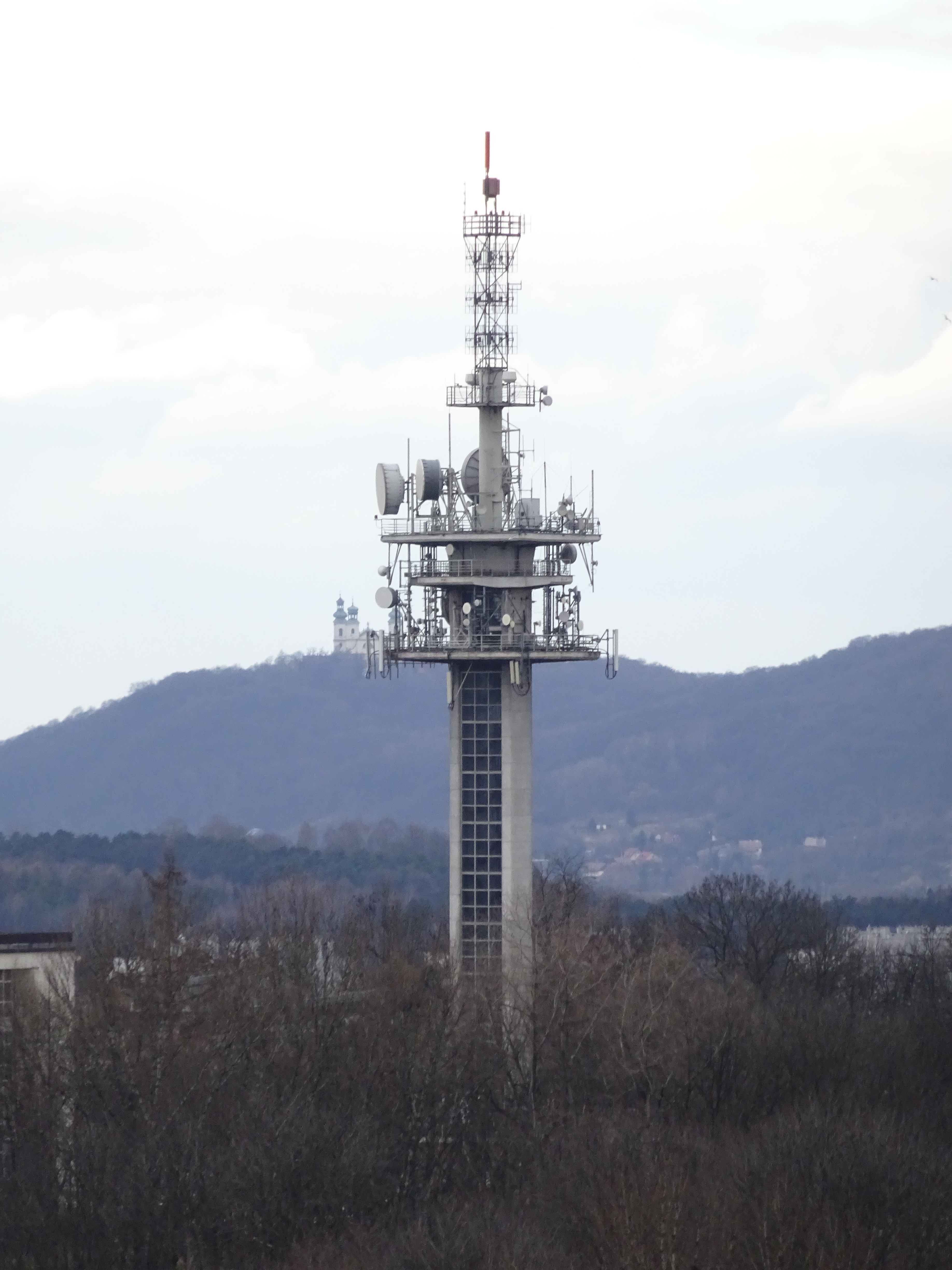 Wieża Telewizyjna w Krakowie - widok z Kopca Kraka, 2016.